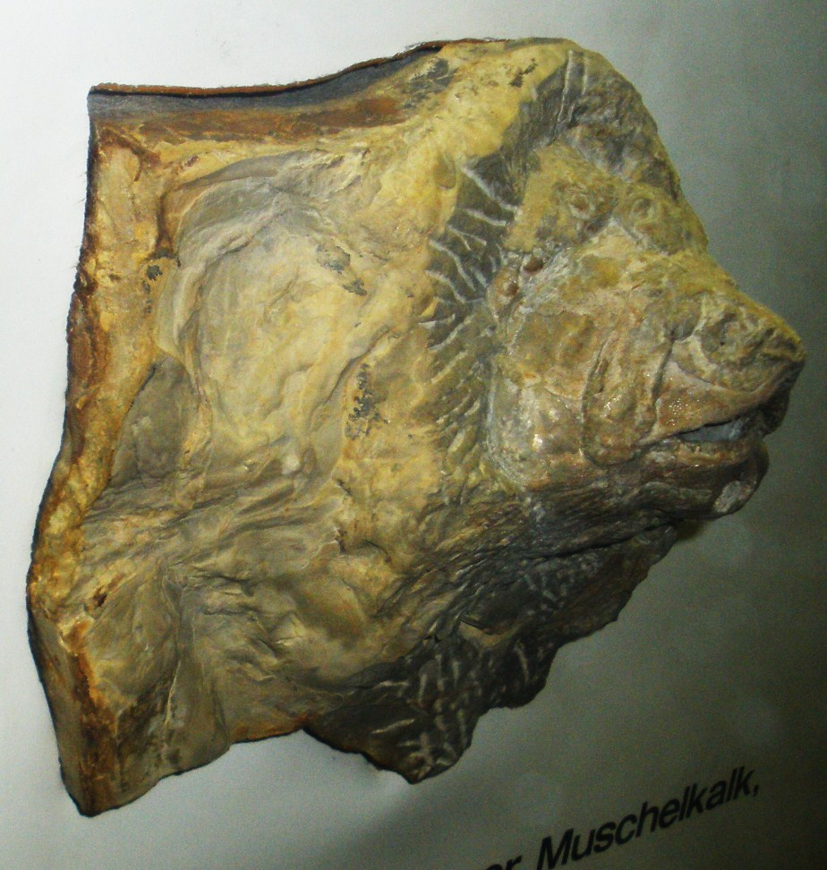 Fossil of Colobodus, an extinct fish- Took the photo at Senckenberg Museum of Frankfurt